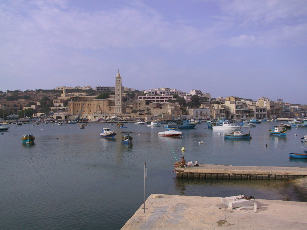 Marsascala, Malta